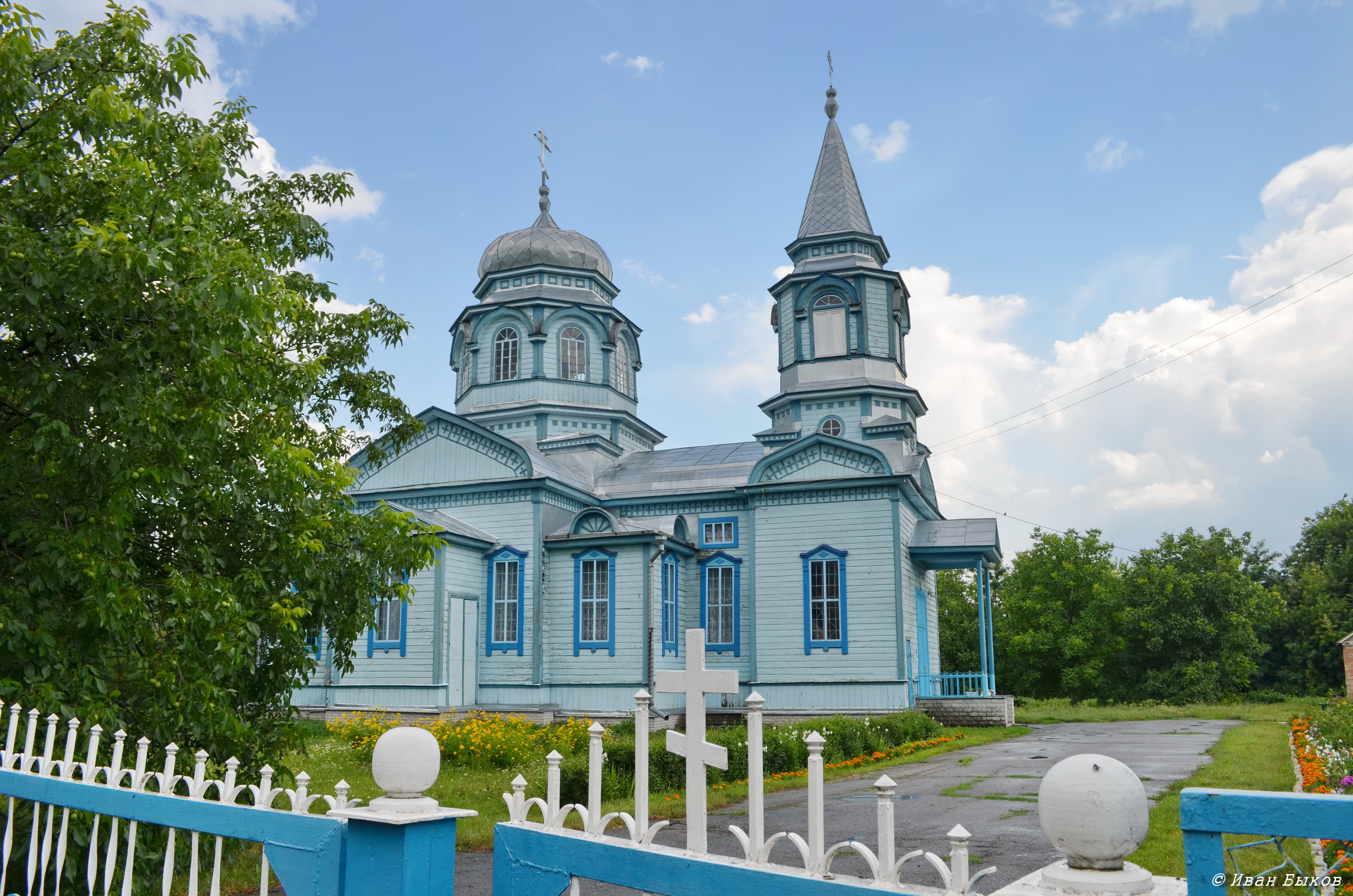 Сулимівка (Жоравські Хутори). Сретенська церква. 1903-05 рр.